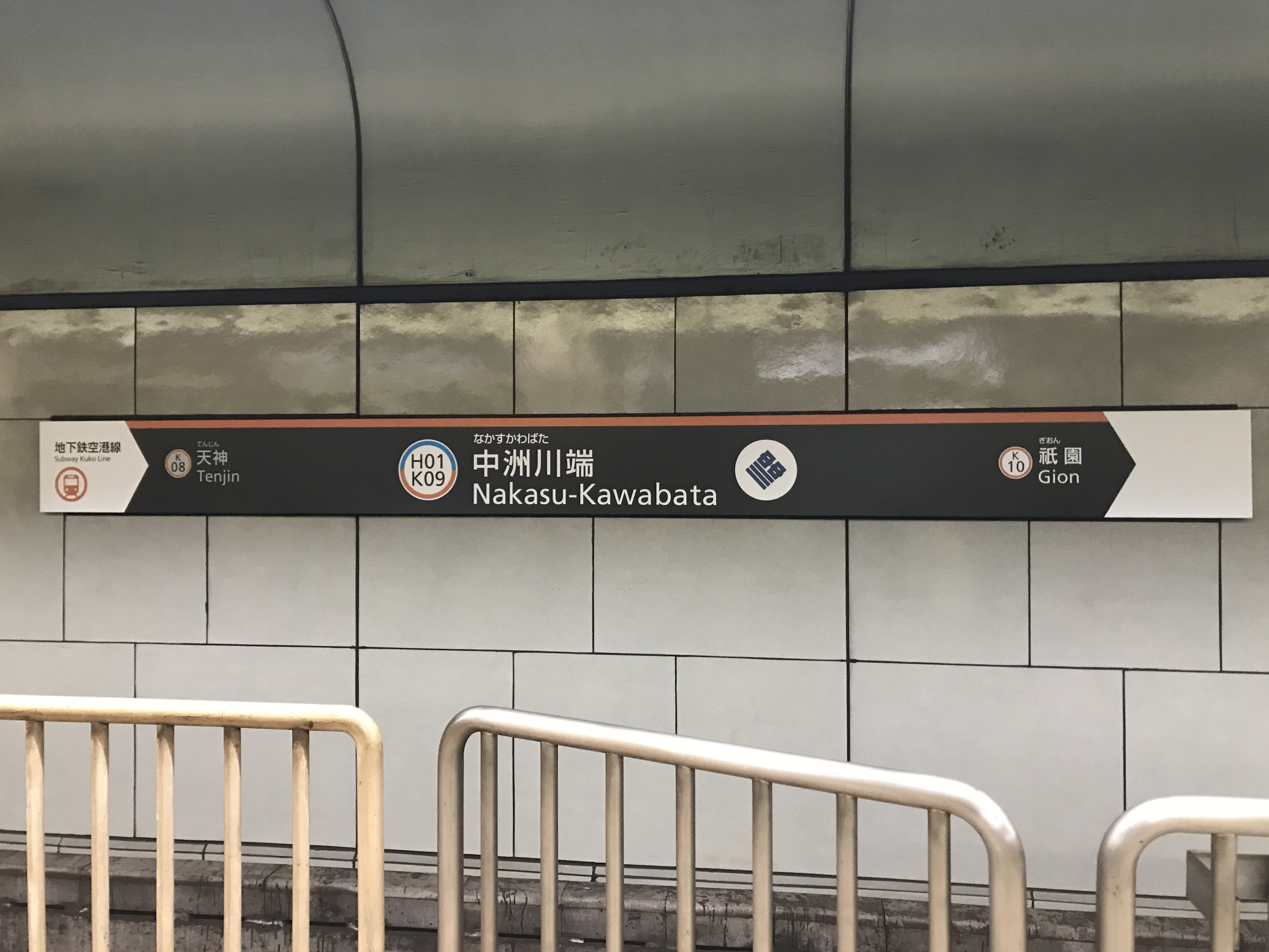 中洲川端駅(空港線)の駅名標。イラストは「中」「川」の模様